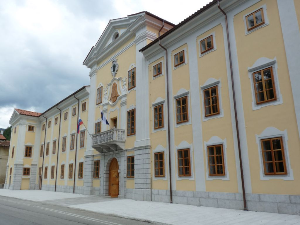 Dvorec Lanthieri, Vipava